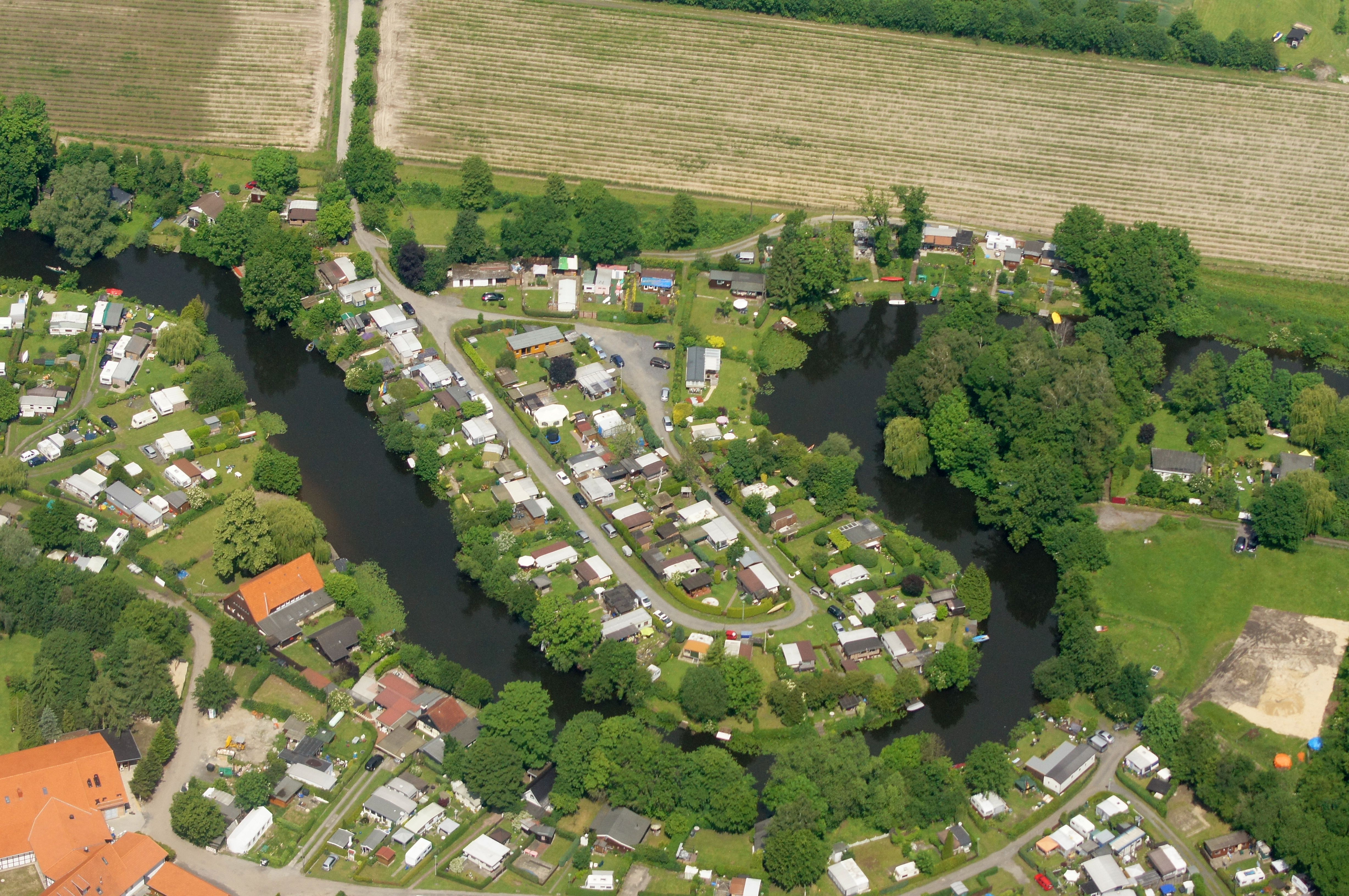 Werseschleife in Handorf, Münster, Nordrhein-Westfalen. Das Foto entstand während des Münsterland-Fotoflugs am 1. Juni 2014. Hinweis: Die Aufnahme wurde aus dem Flugzeug durch eine Glasscheibe hindurch fotografiert.